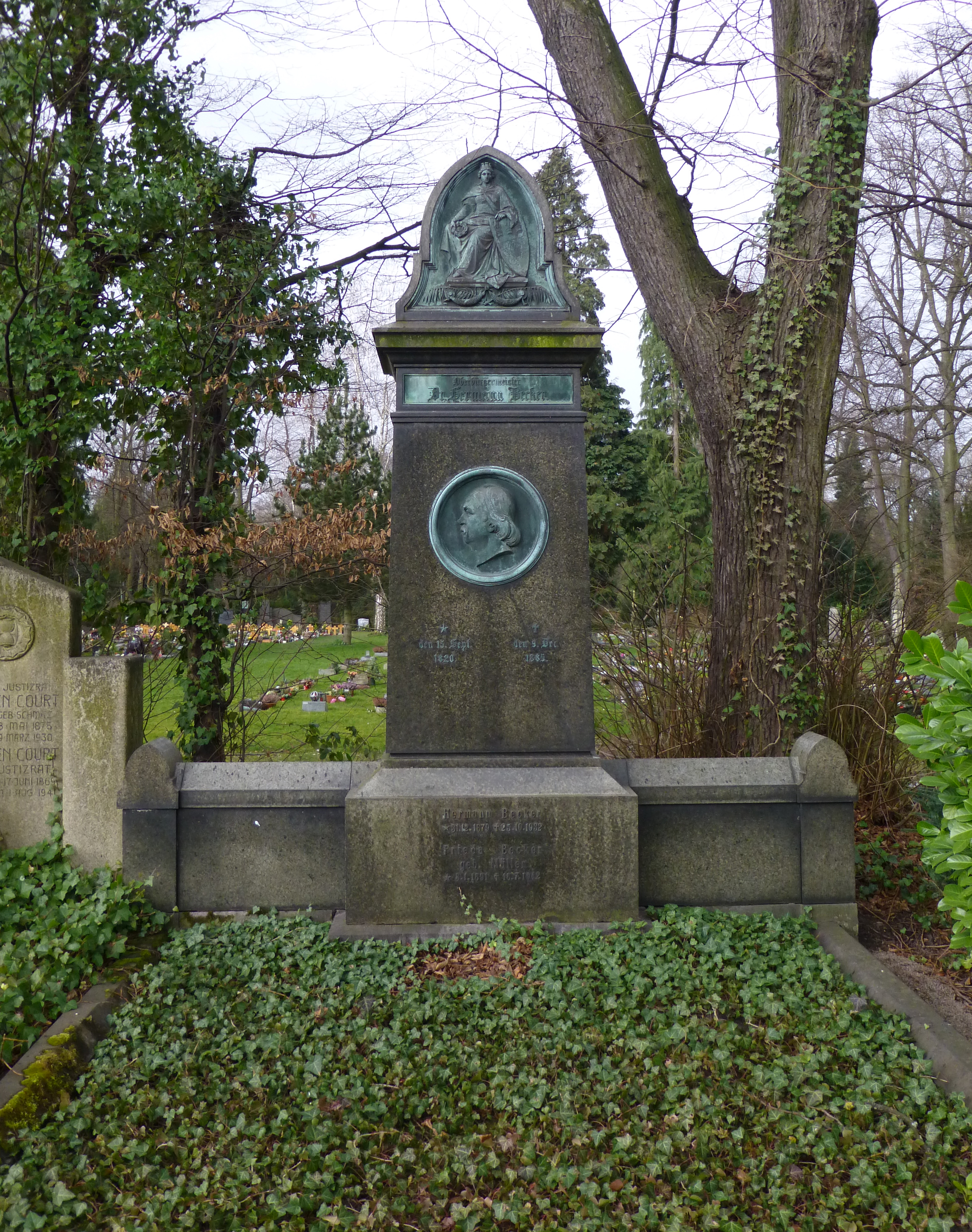 Grabmal von Hermann Heinrich Becker mit Bronzerelief vom Künstler Anton Werres auf dem Kölner Melaten-Friedhof (HWG, zwischen Lit. M+T). Künstler: Anton Werres (1830–1900) DescriptionGerman artistdeutscher BildhauerDate of birth/death 1 January 1830 27 April 1900Location of birth/death Cologne CologneWork location Cologne, RomAuthority control : Q15729050 VIAF: 81616740 ISNI: 0000 0000 6689 7990 ULAN: 500088900 GND: 137423101 creator QS:P170,Q15729050